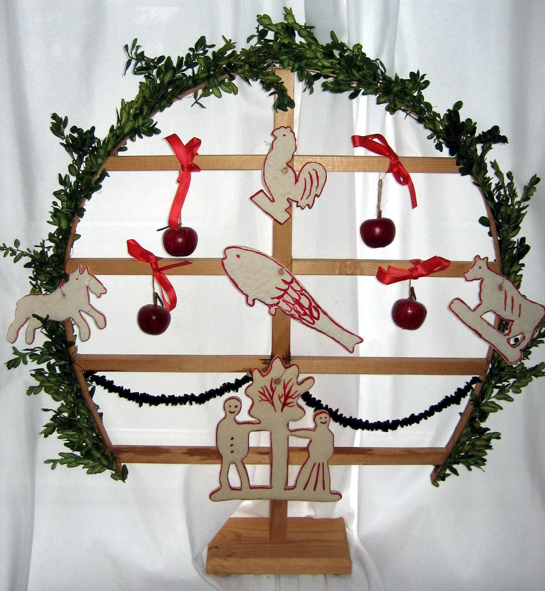 Nordfriisk: Kenkenbuum faan Oomram